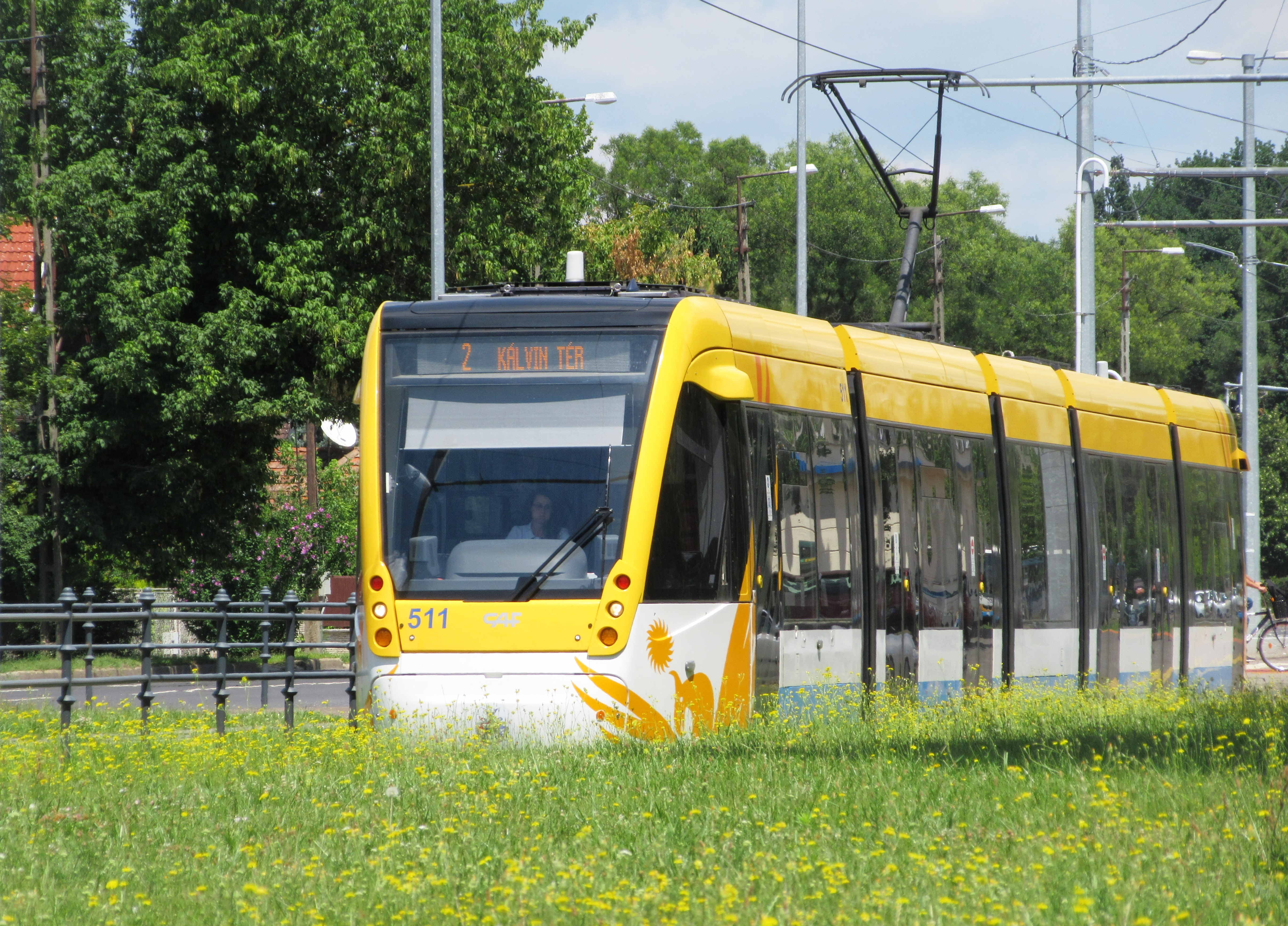 CAF Urbos 3